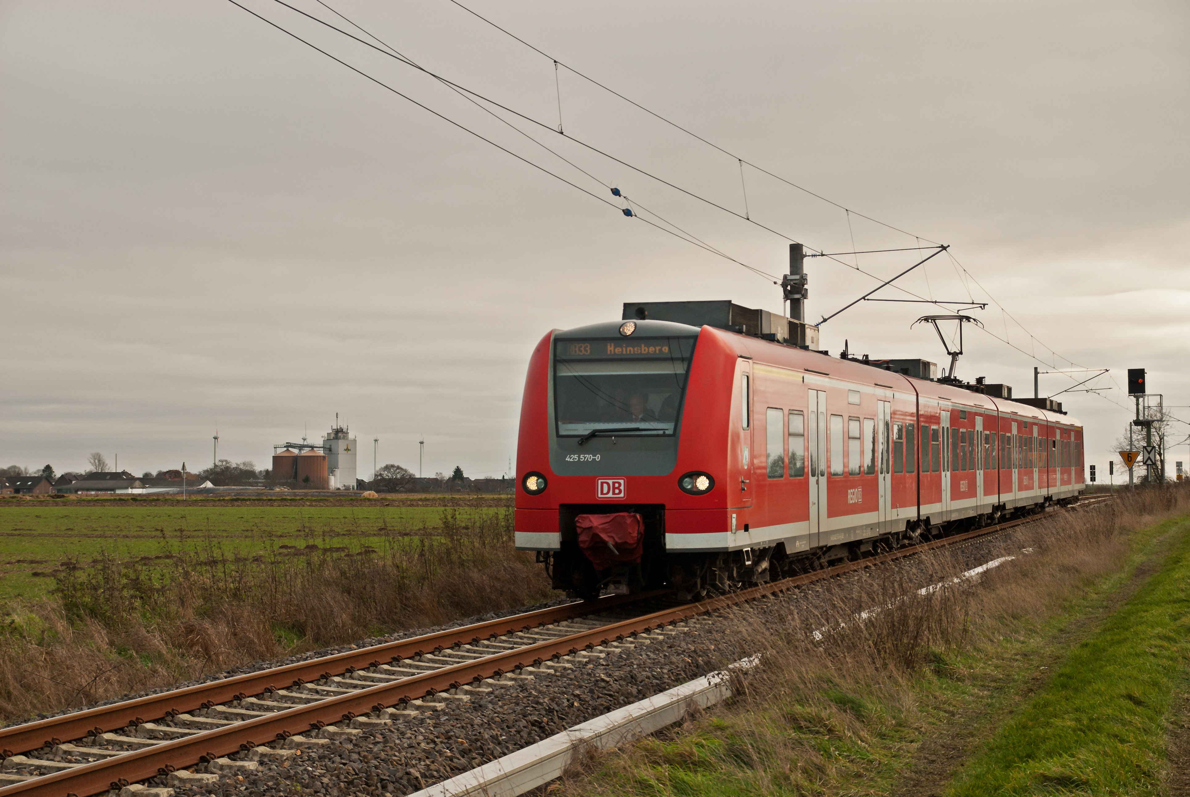 Regionalbahn 33 auf dem Weg nach Heinsberg. Aufnahme vom ersten Betriebstag aus dem Feld zwischen Honsdorf und Lindern, Triebzug der BR 425 im Gefälle zum Wurmtal